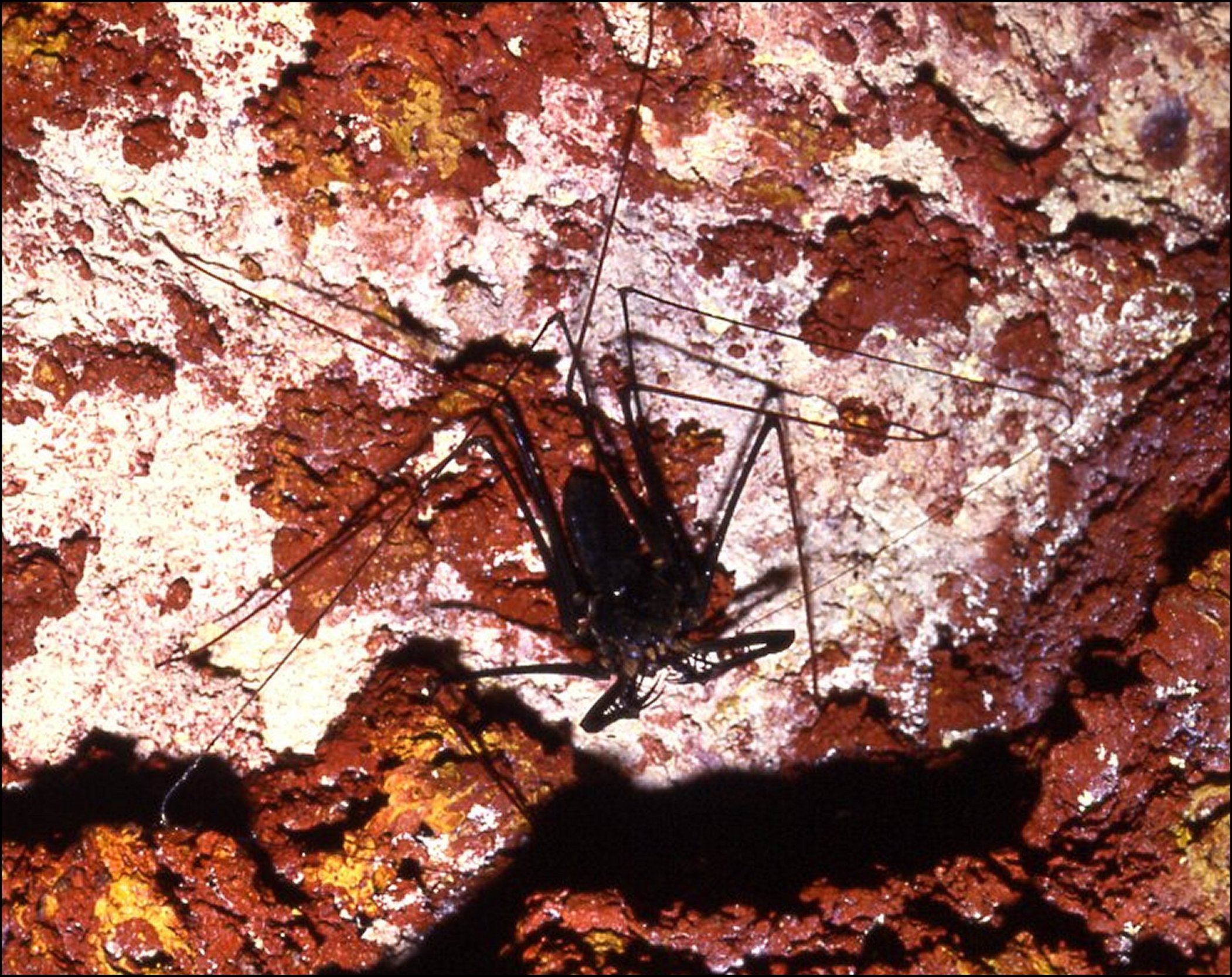 Heterophrynus longicornis, grotte Fourgassie, Guyane